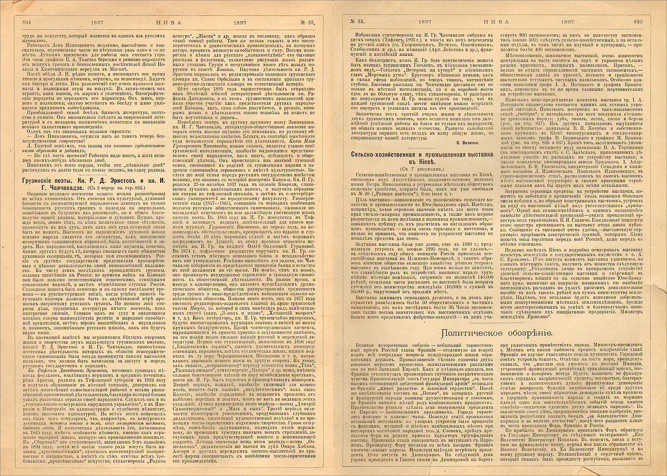 Василий Величко об И. Г. Чавчавадзе и Р. Д. Эристове. Нива, 1897 г.